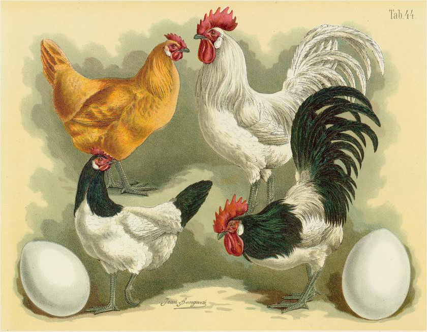 Lakenfelder u. Ramelsloher Huhn. Gallus dom. westfalicus. – Gallus dom. lueneburgensis.